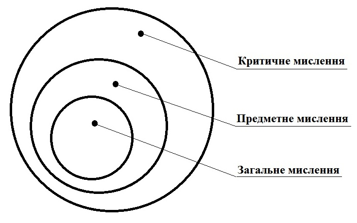 Структура мислення. Критичне мислення контролює предметне і загальне мислення, є мисленням вищого порядку